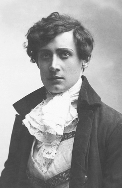 portrett, mann, skuespiller, sittende halvfigur.